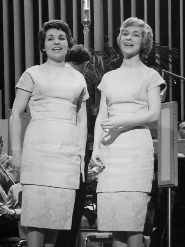 Laatste uitzending "Tussen Keulen en Parijs" , de Salveras 5 april 1960